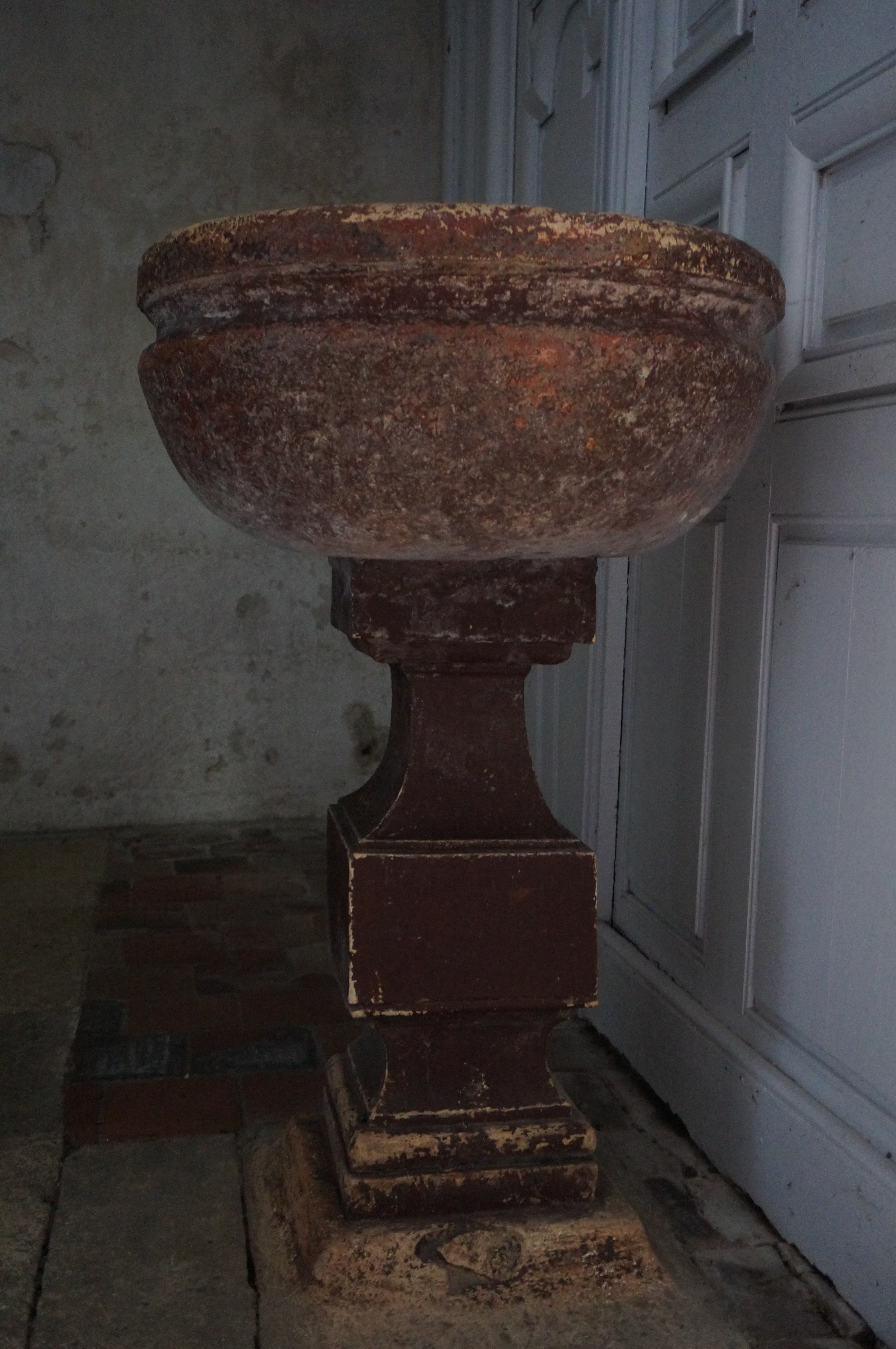 FONTS baptismaux.